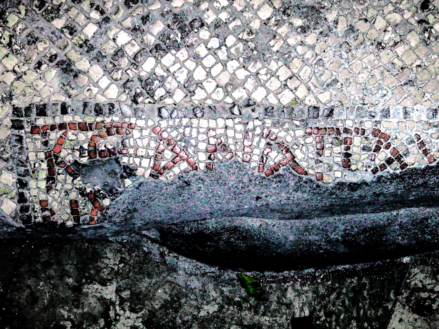 Jerozolima, Grota Pojmania Jezusa, Grota Getsemani